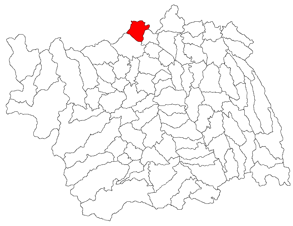 Categorie:Hărţi ale judeţului Bacău